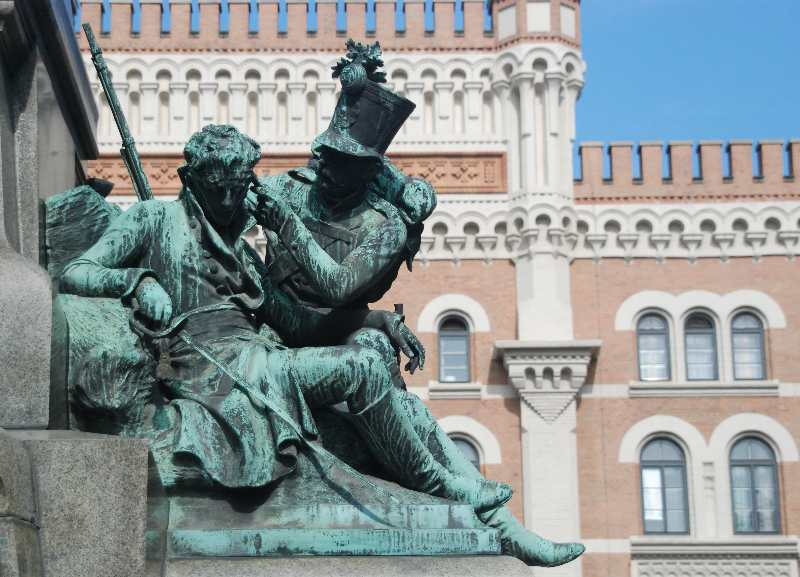 "Der getreue Kamerad" - eine Figurengruppe am Deutschmeister-Denkmal in Wien